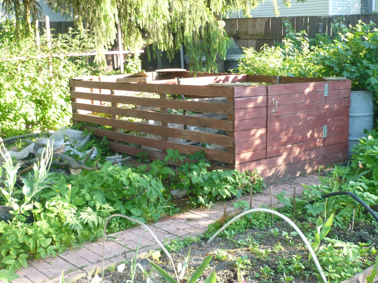 Компост в дачном хозяйстве